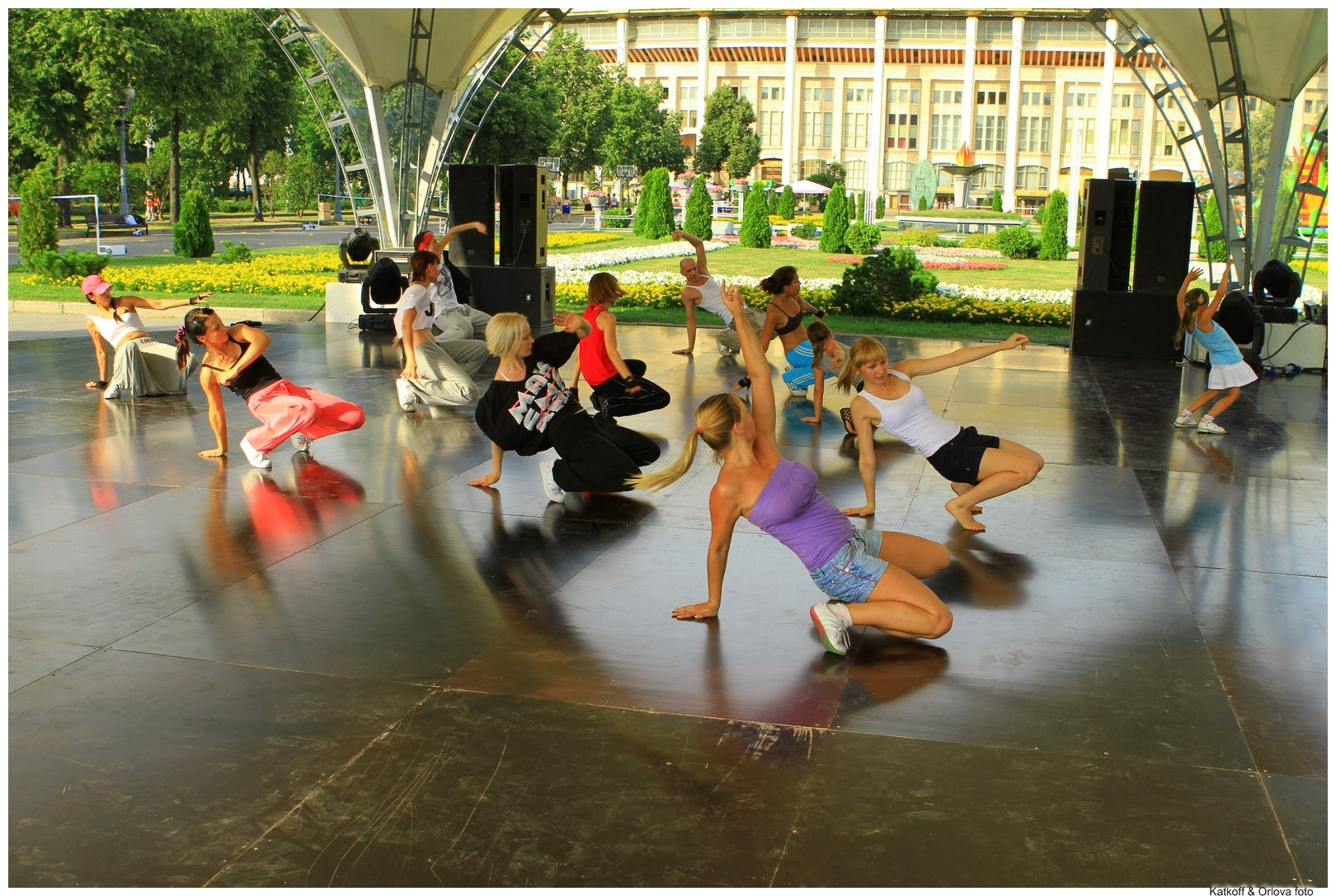 Семейный летний отдых в Лужниках